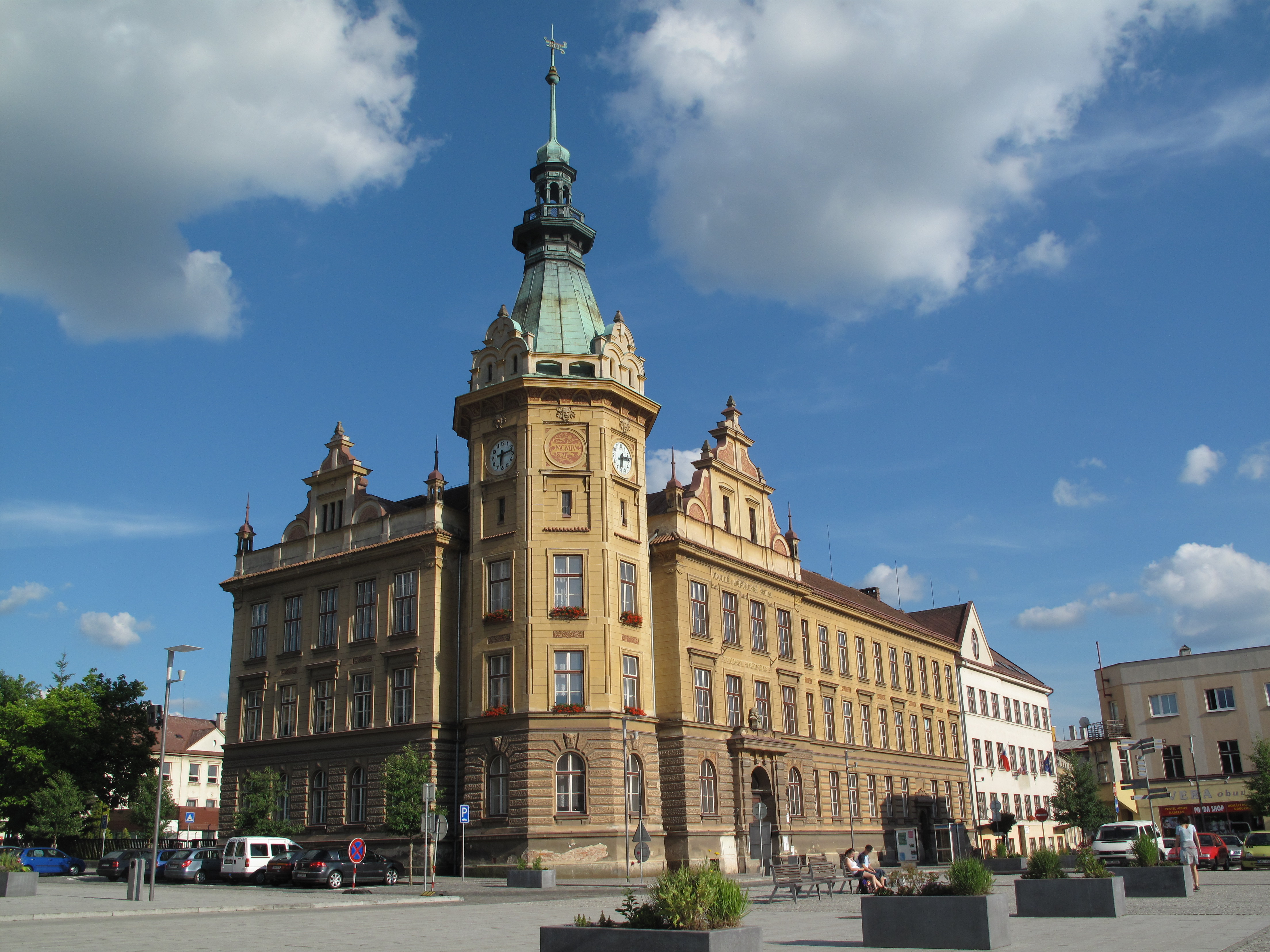 Hronov